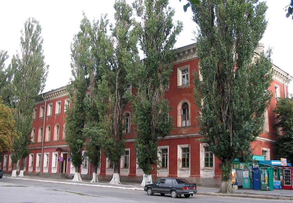 Комплекс кавалерійського юнкерського училища, 1848 рік.